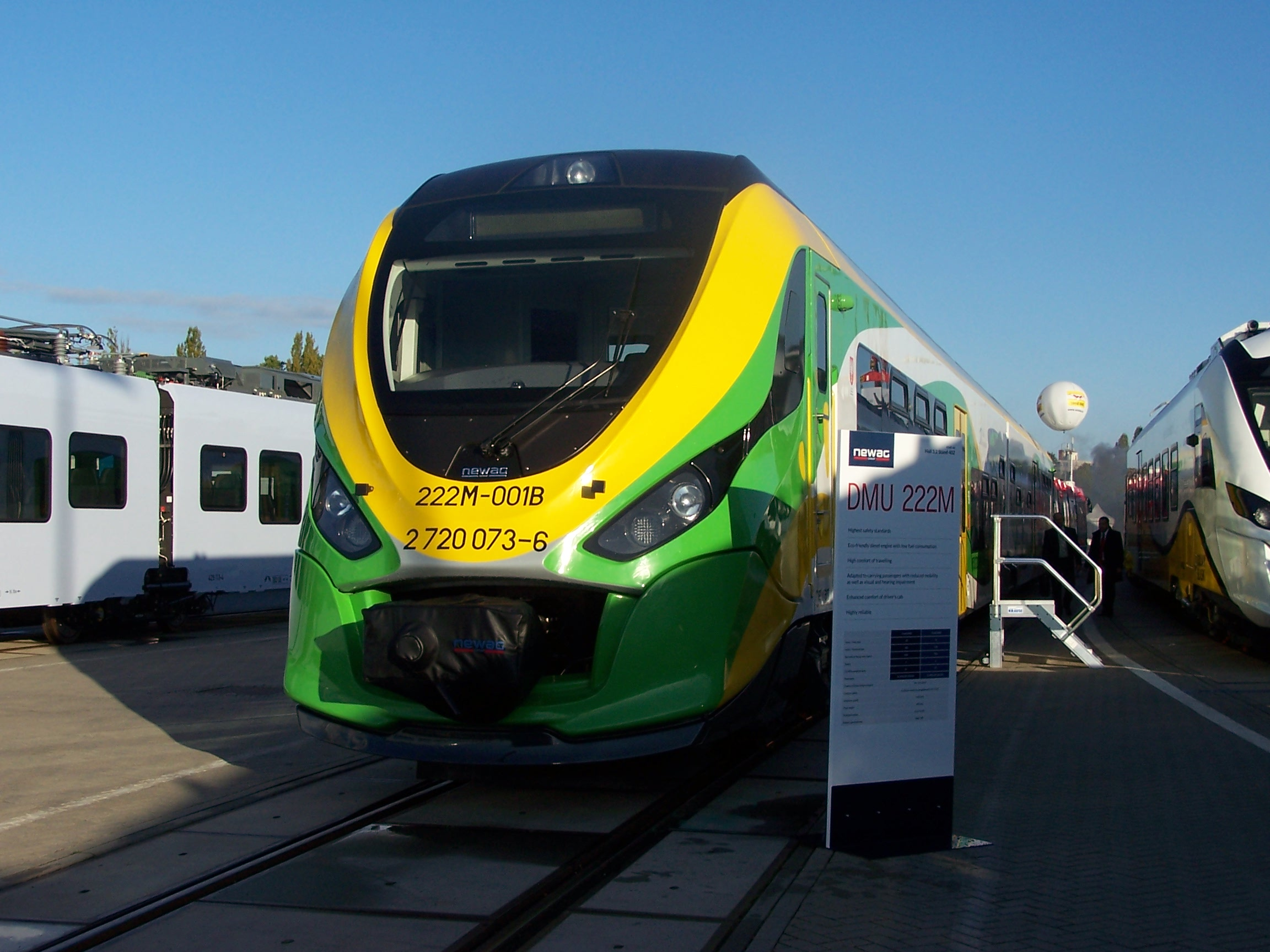 NEWAG 222M 001 auf der InnoTrans 2014.